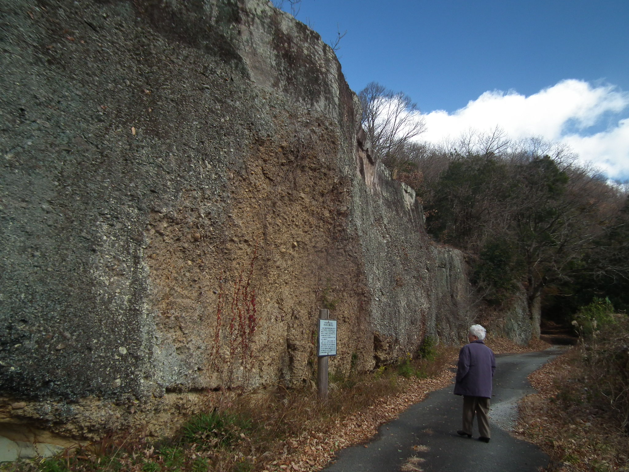 Kidu-Magaibutsu 木津磨崖仏 神戸市西区押部谷町木津